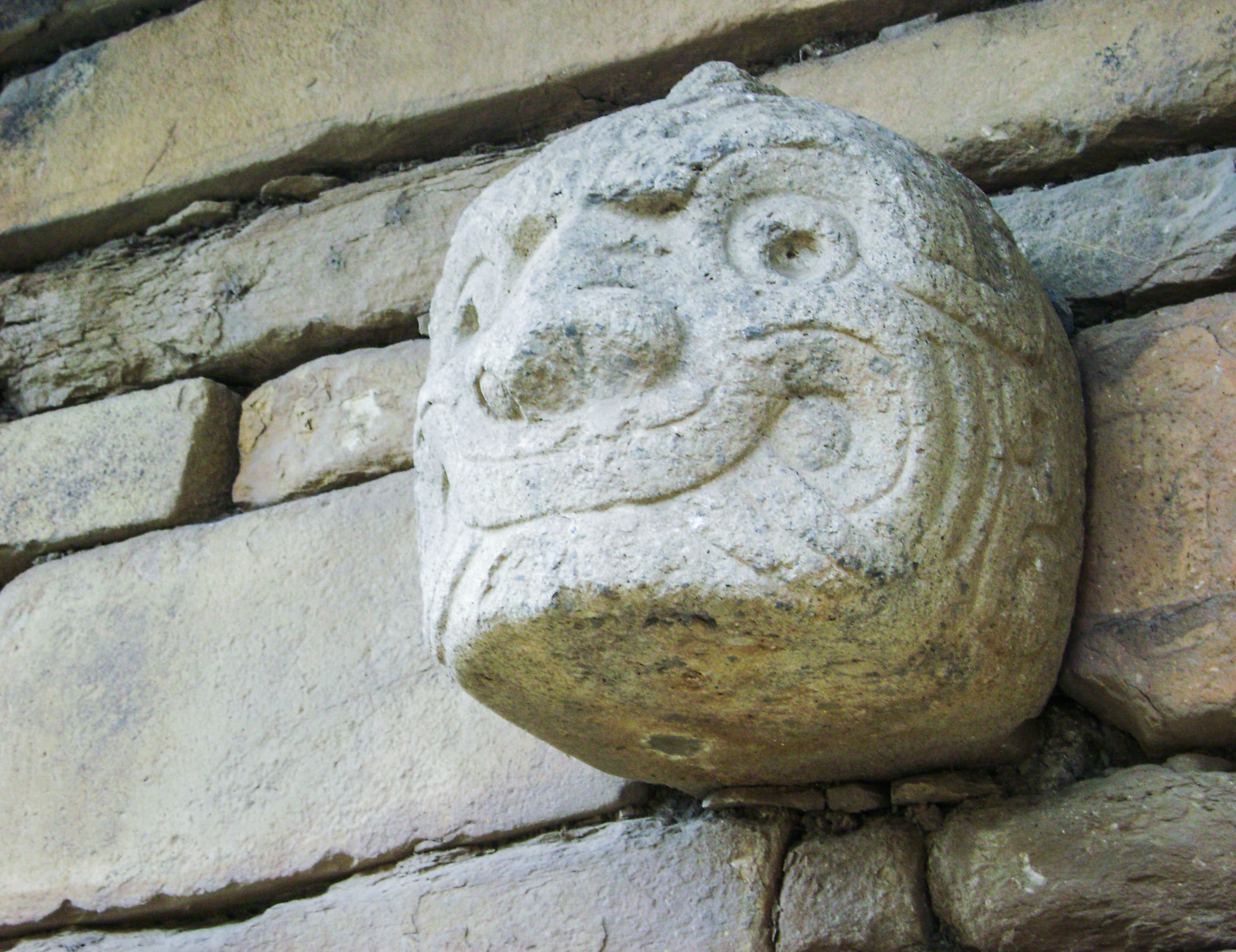 Cabeza clava en Chavín de Huántar. Unica que permanece en su ubicación original.